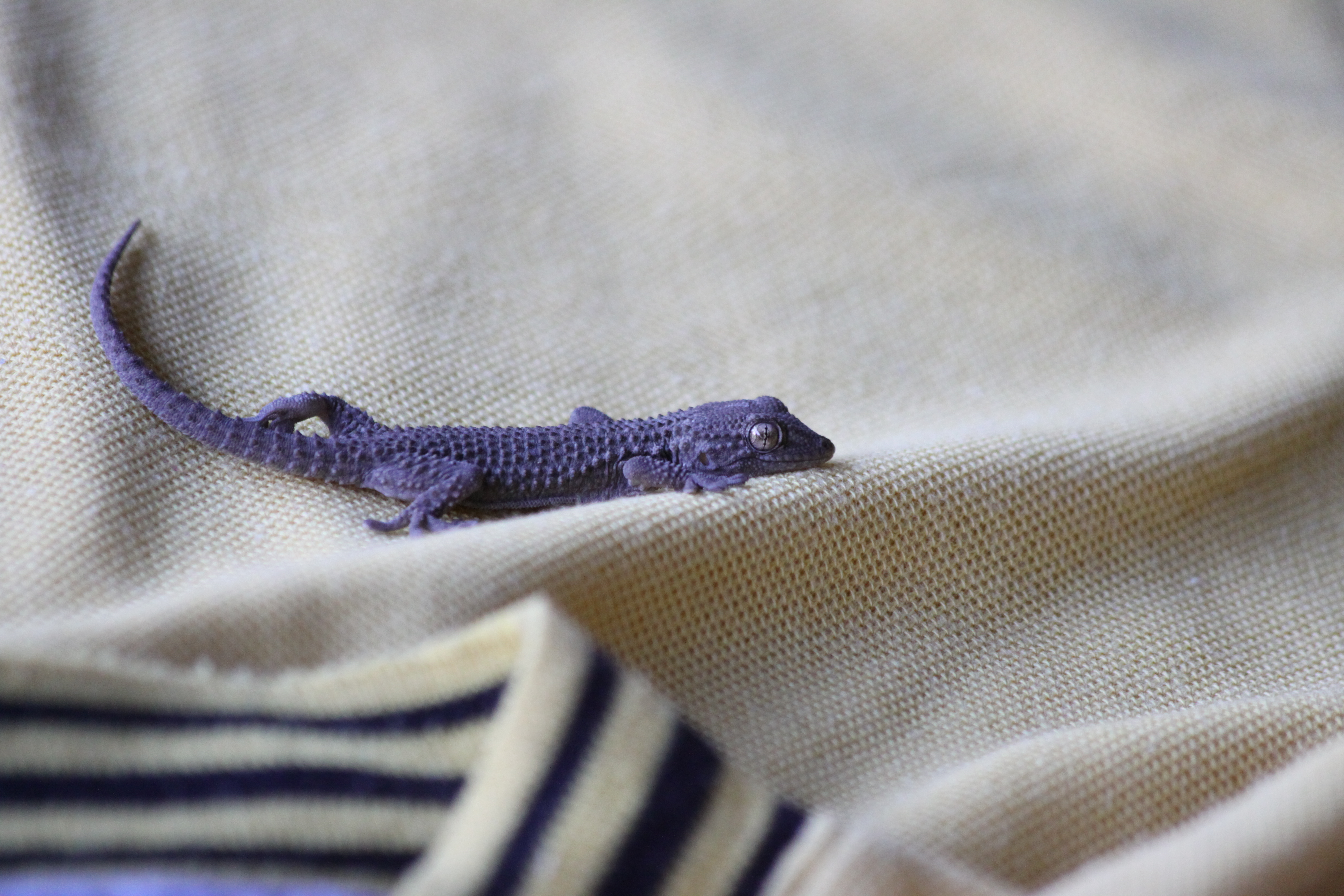 Gekkon murowy (Tarentola mauritanica)